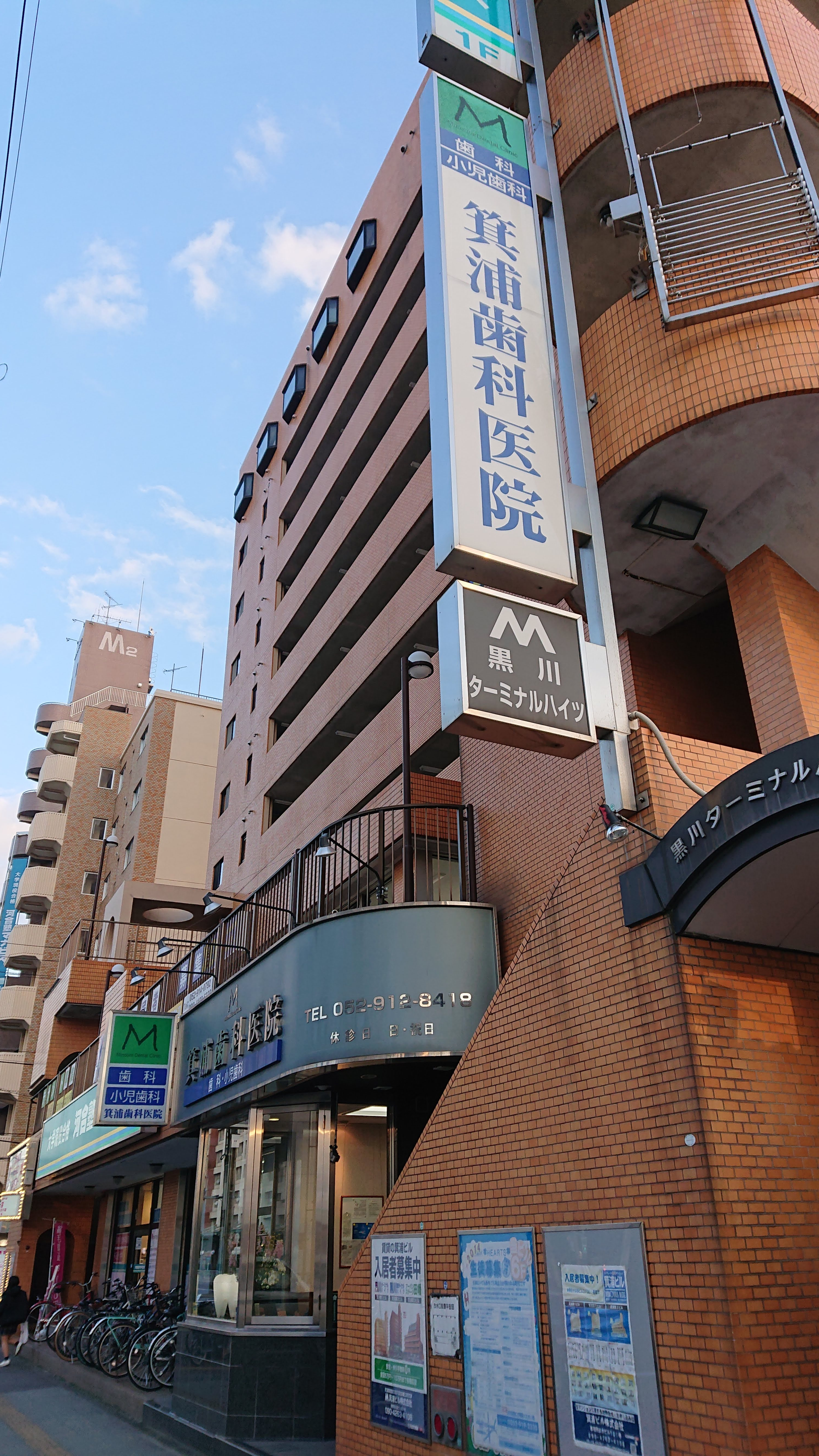 名古屋市北区田幡二丁目の箕浦歯科医院